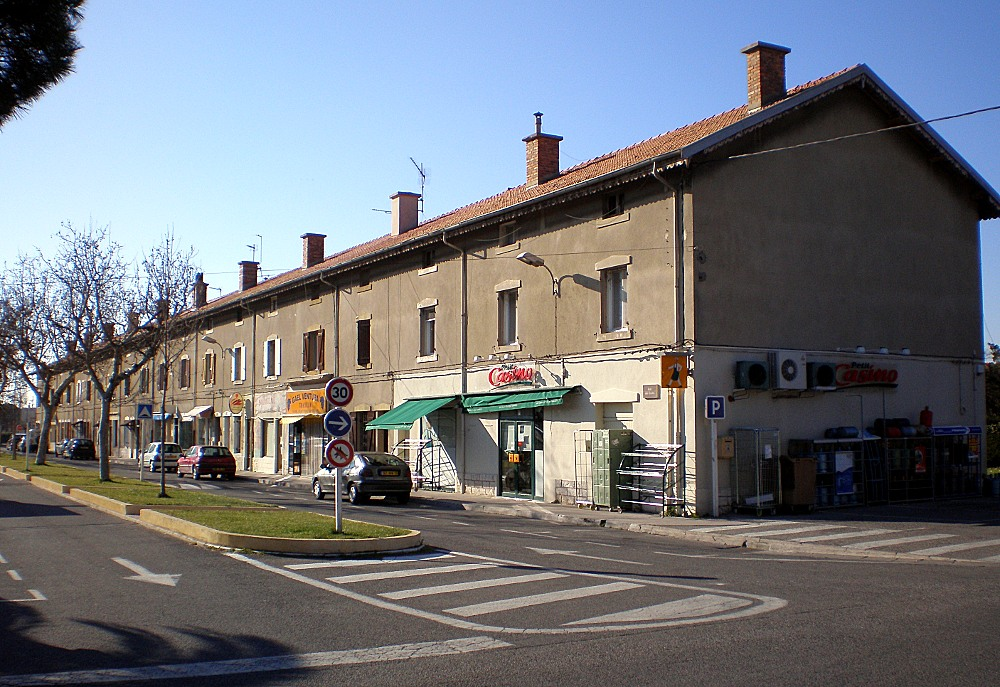 Une rue typique de Salin-de-Giraud, commune d'Arles (France)